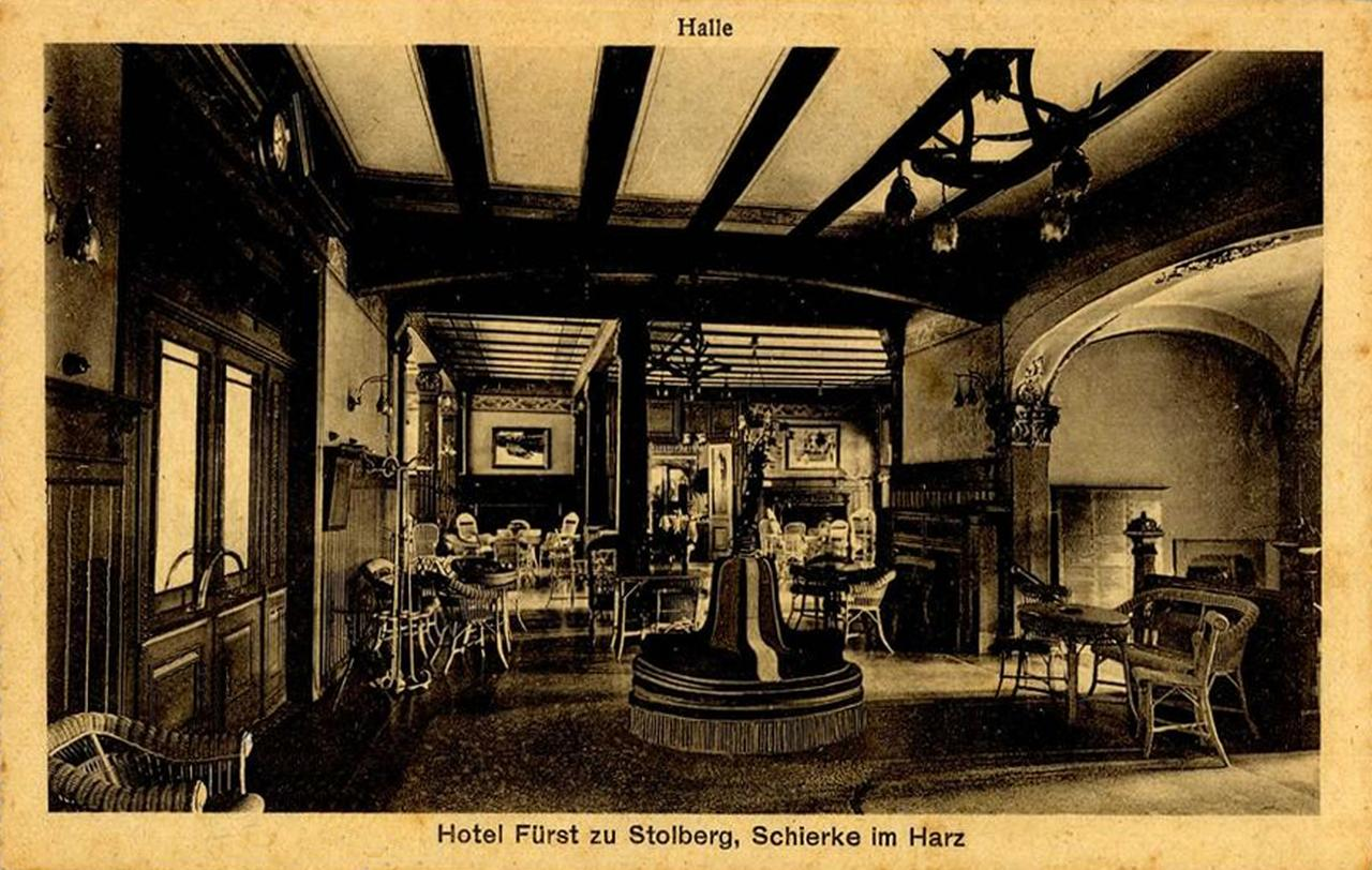 Schierke, Hotel „Fürst zu Stolberg“, Hotelhalle